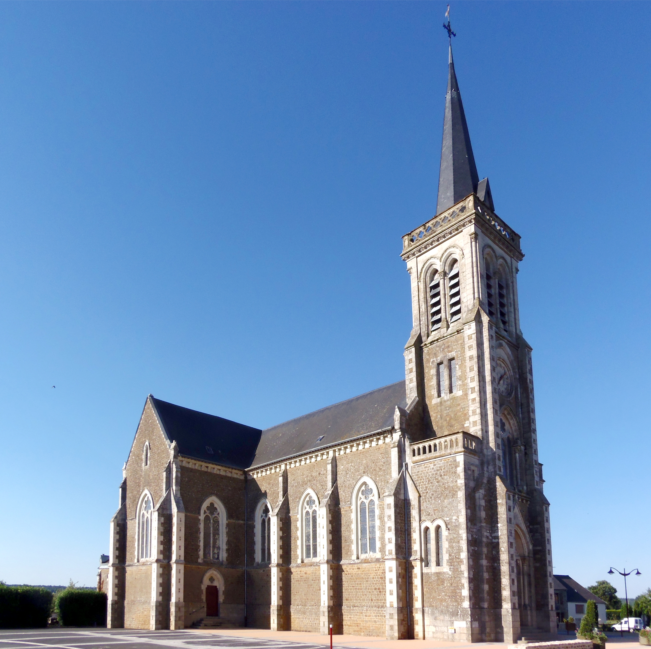 Saint-Calais-du-Désert (Pays de la Loire, France). L'église Saint-Calais.